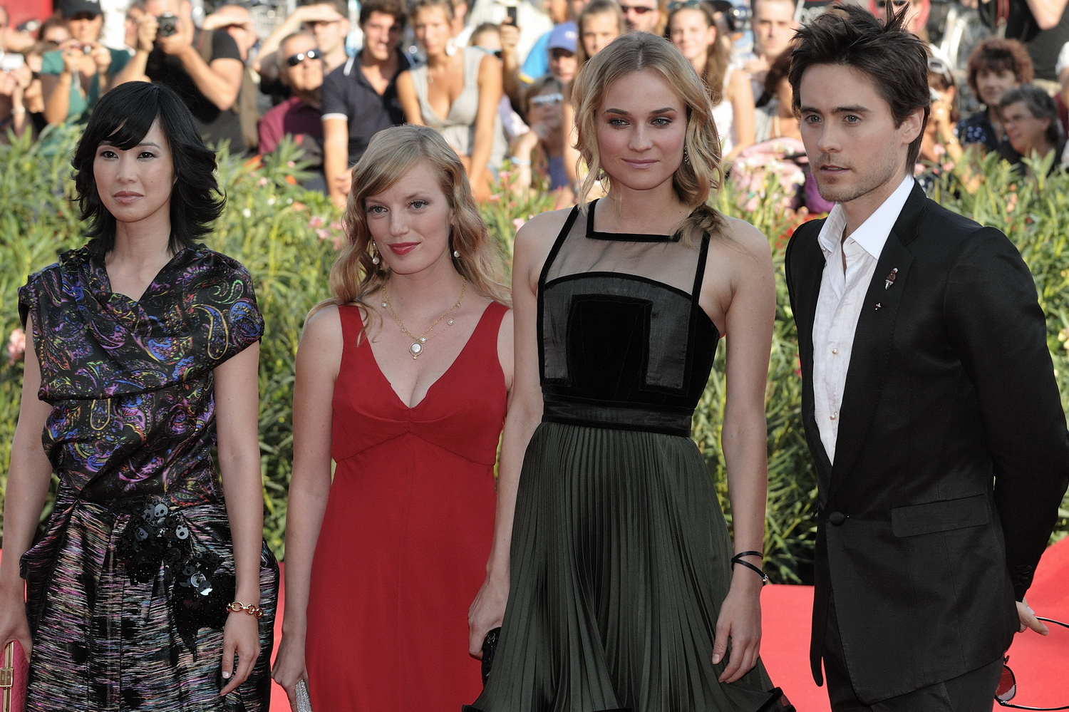 66ème Festival du Cinéma de Venise (Mostra), 10ème jour (11/09/2009) Tapis rouge avec Jared Leto, Diane Kruger, Sarah Polley et Linh Dan Pham pour le film : MR. NOBODY